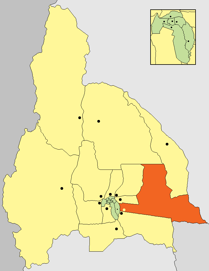 Departamento Caucete (San Juan - Argentina)